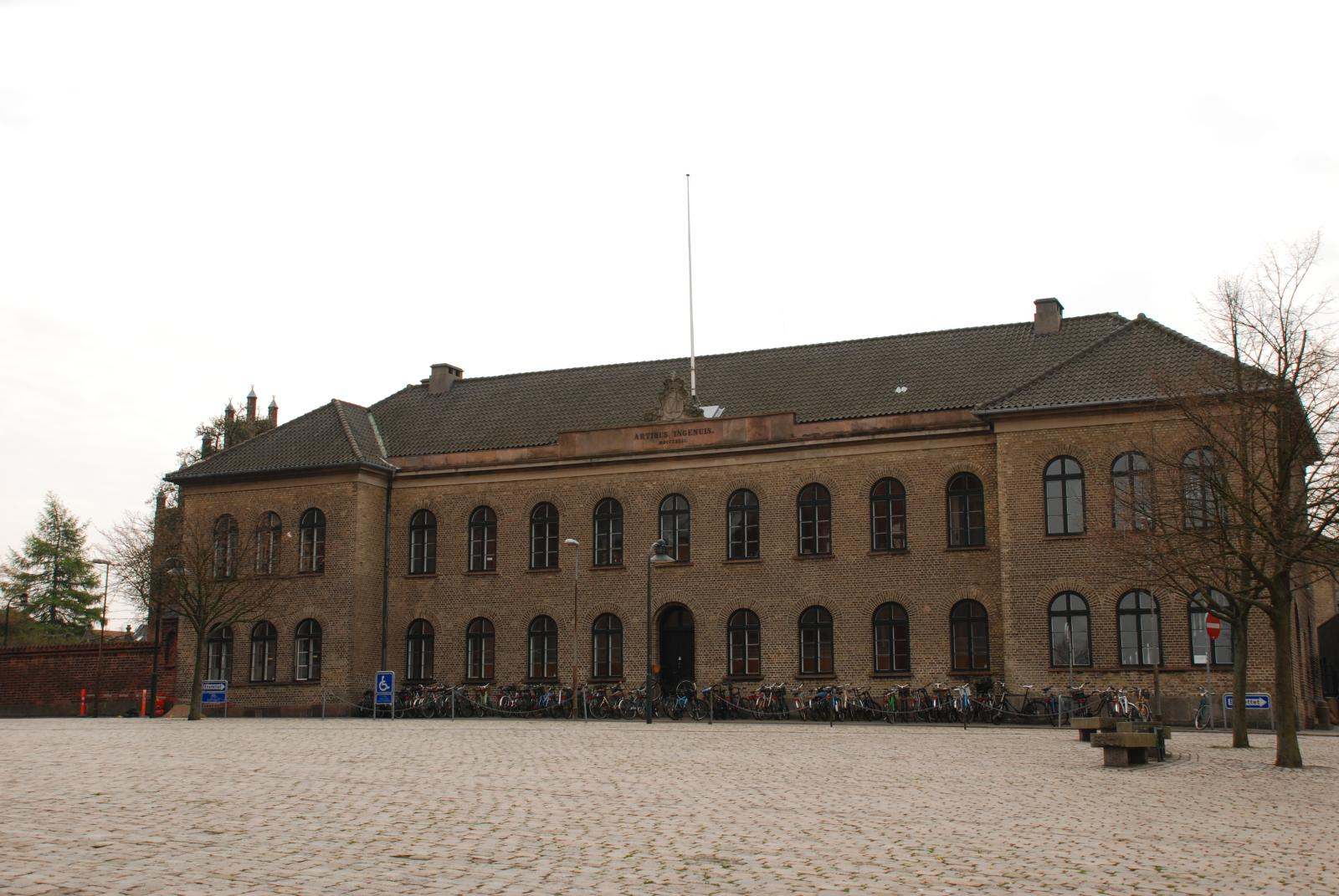 Roskilde Gymnasium (originally Roskilde Katedralskole) in central Roskilde, Denmark. Built in 1842 in the Neo-Classical style to a design by Jørgen Hansen Koch